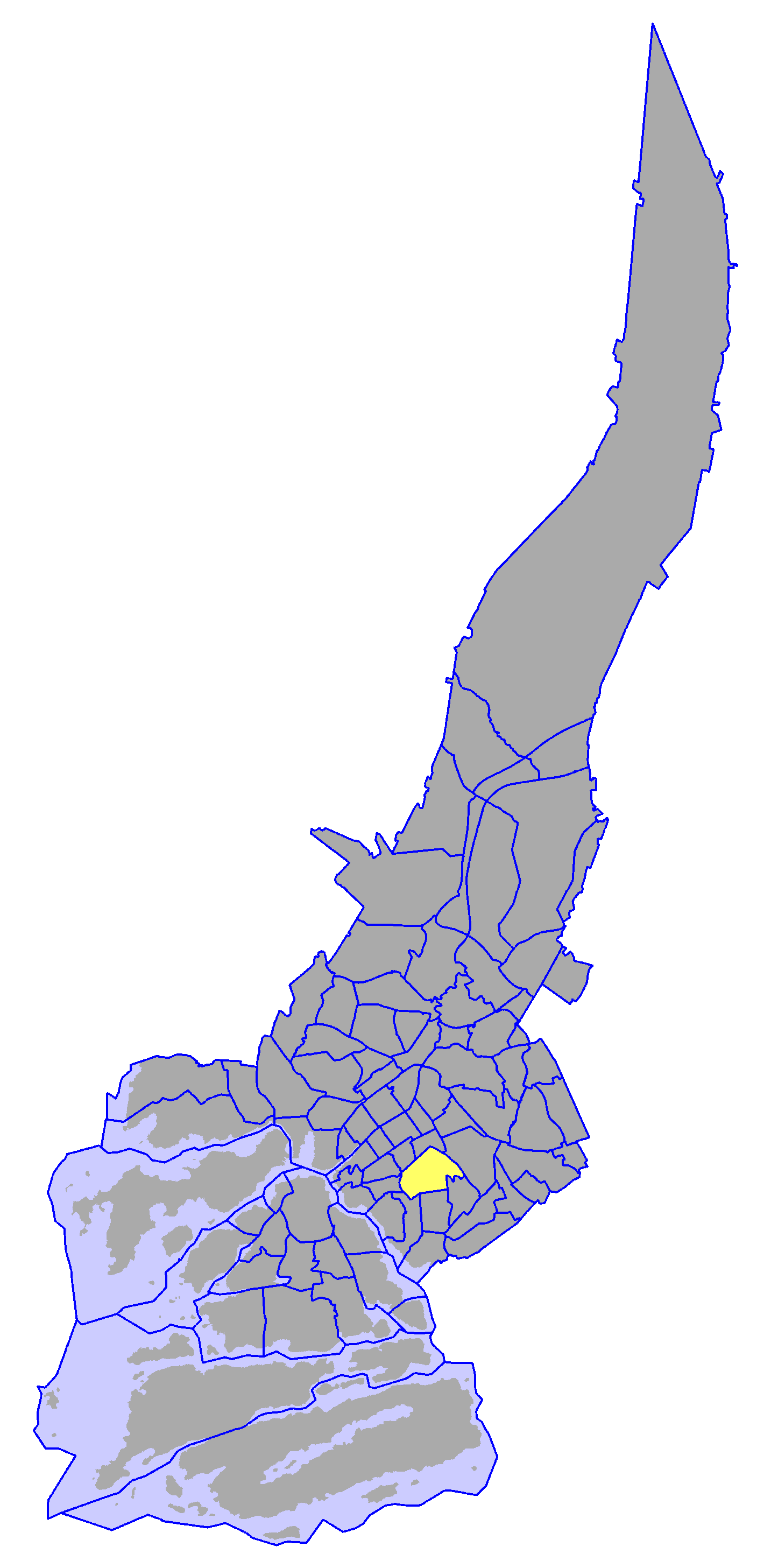 District of Luolavuori, in Turku